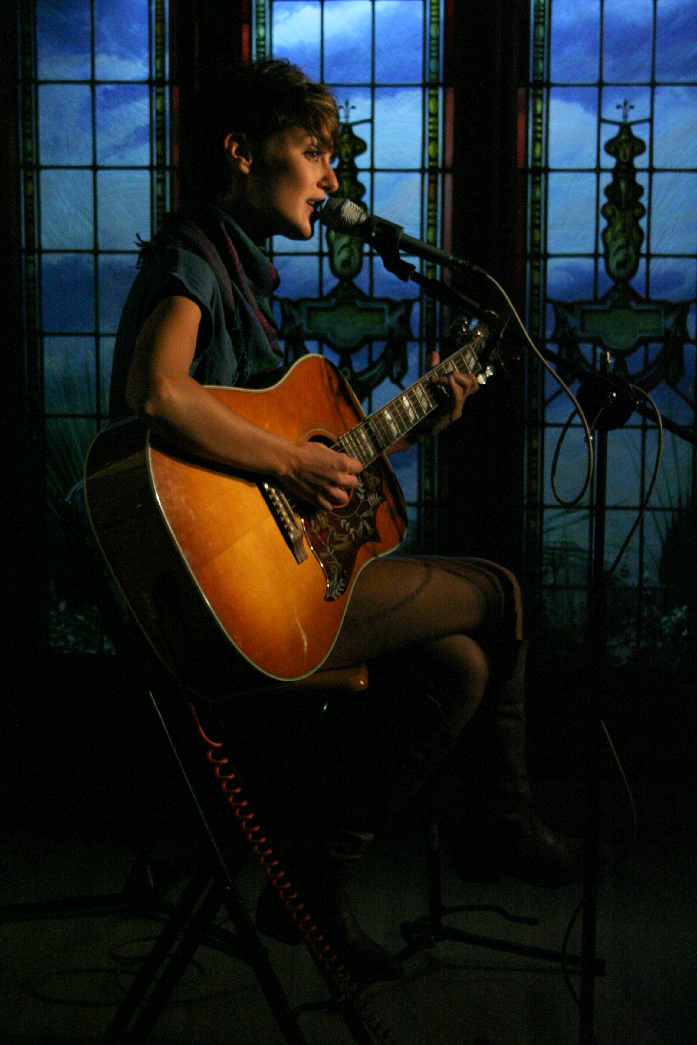 Vega durante un concierto acústico en Búho Real, Madrid.